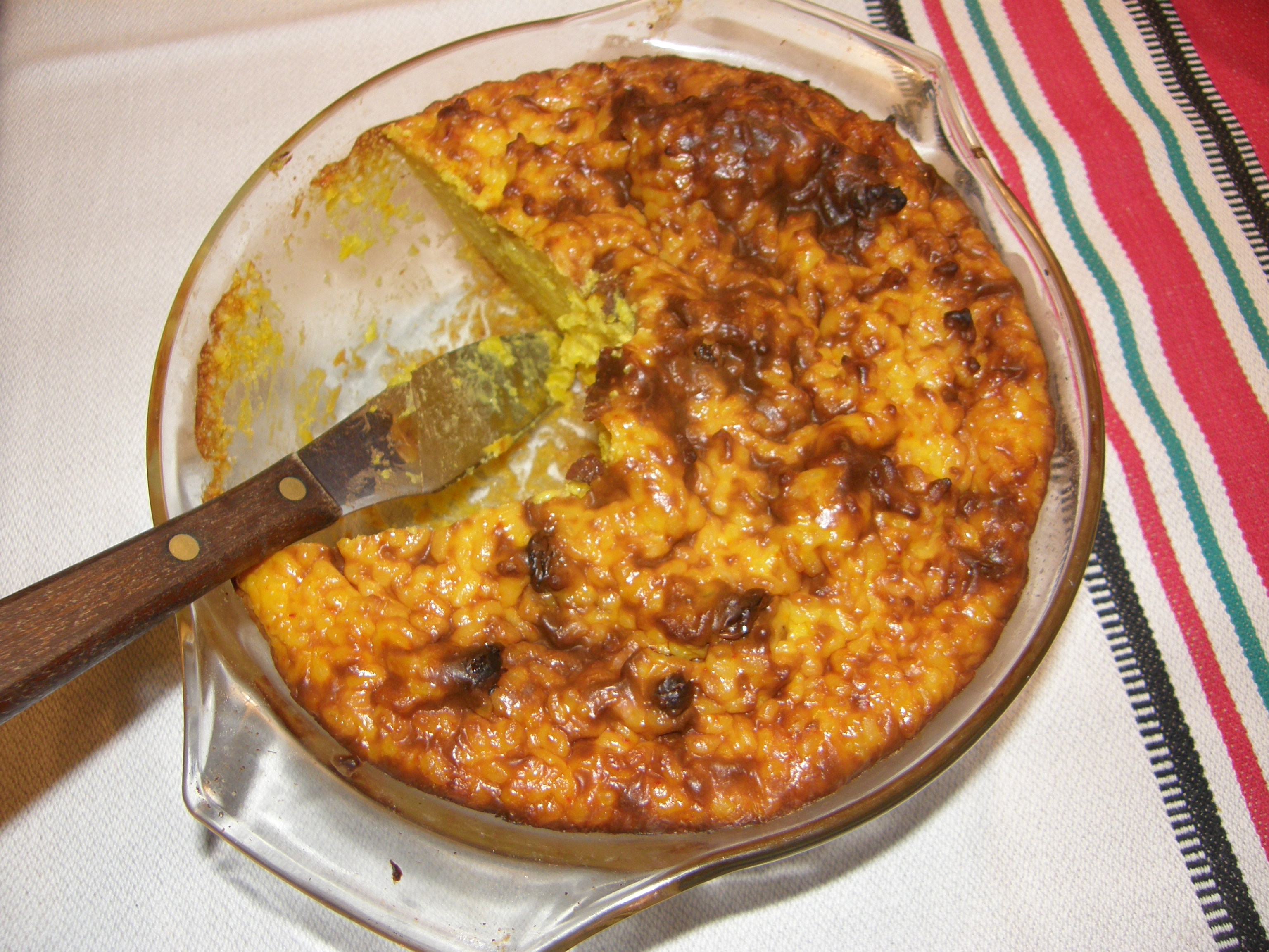 Risgrynspudding med saffran